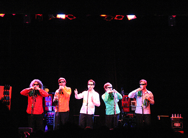 GlasBlasSing Quintett, deutsche Musikgruppe, macht Blasmusik auf (leeren) Flaschen = Flaschenmusik, hier bei einem Konzert in München